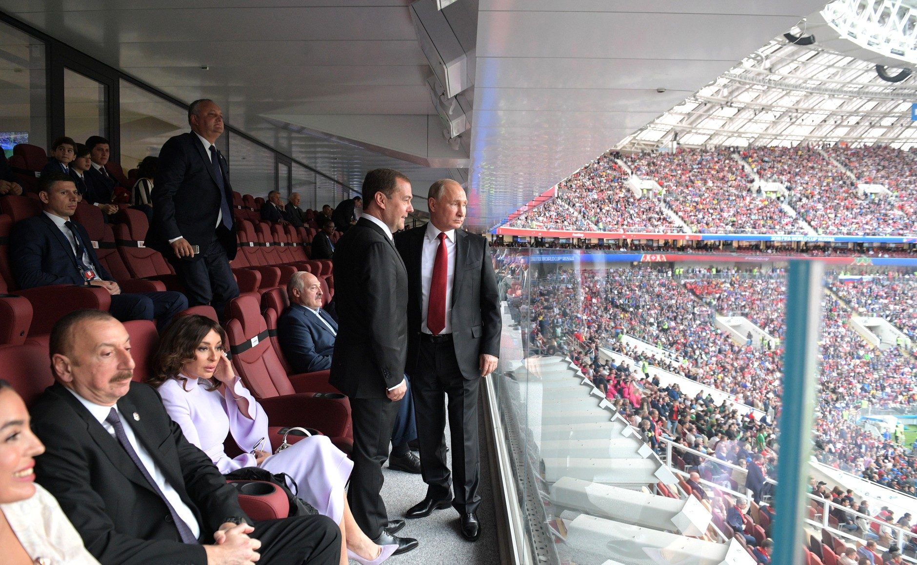 В перерыве матча Президент России Владимир Путин кратко пообщался с иностранными гостями, прибывшими на Чемпионат мира по футболу 2018 года